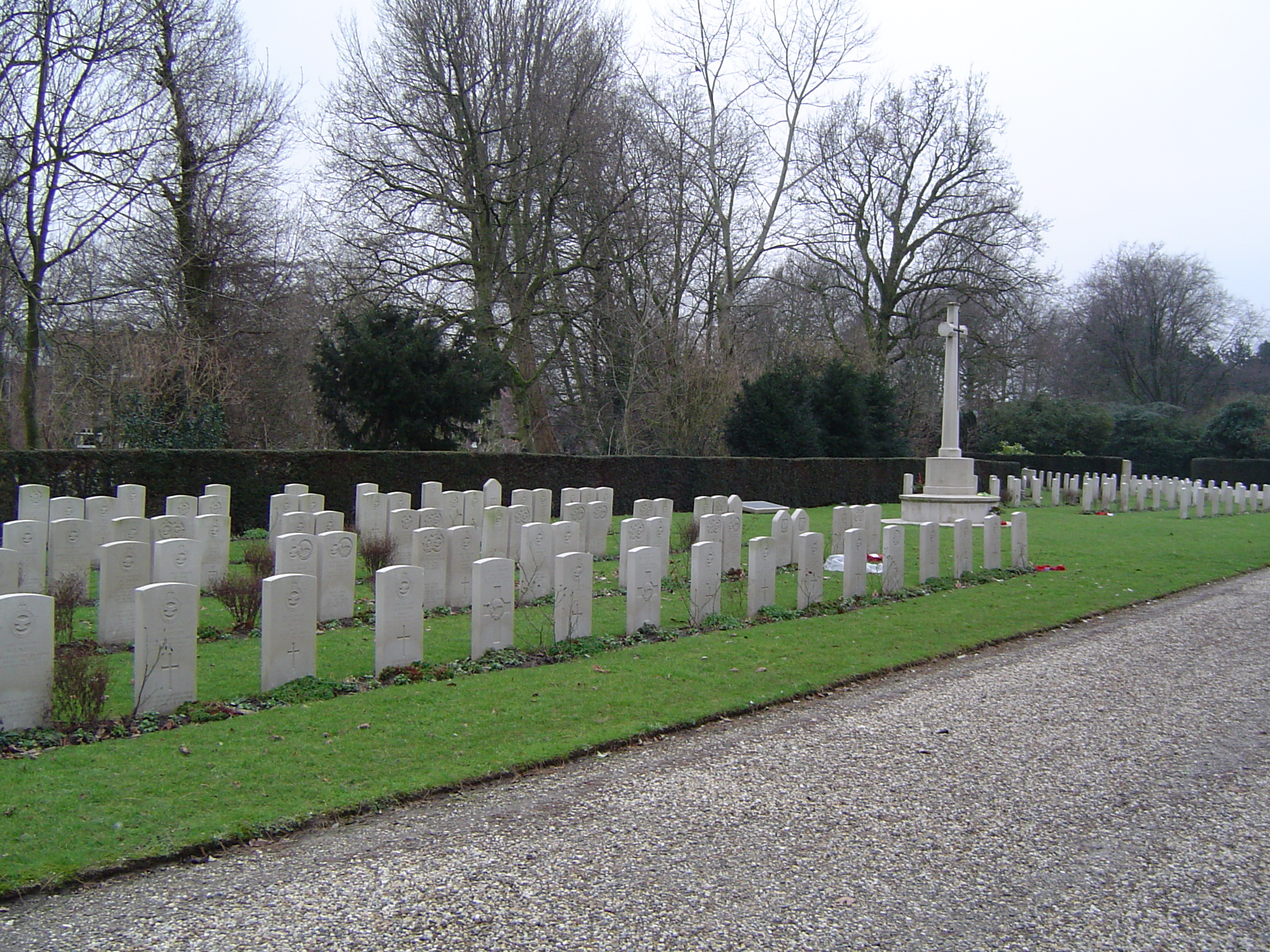 Grafveld van Gesneuvelde Geallieerden Eigen foto